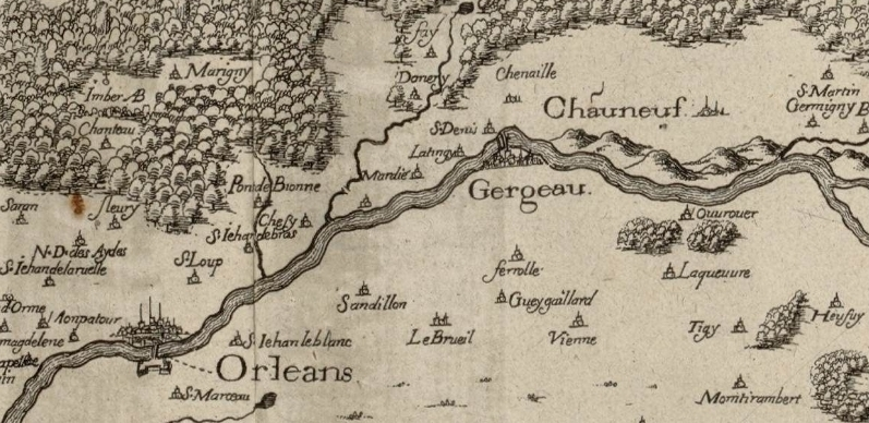 La ville de Jargeau (alors appelée Gergeau) sur une carte représentant une partie du Duché d'Orléans en 1634